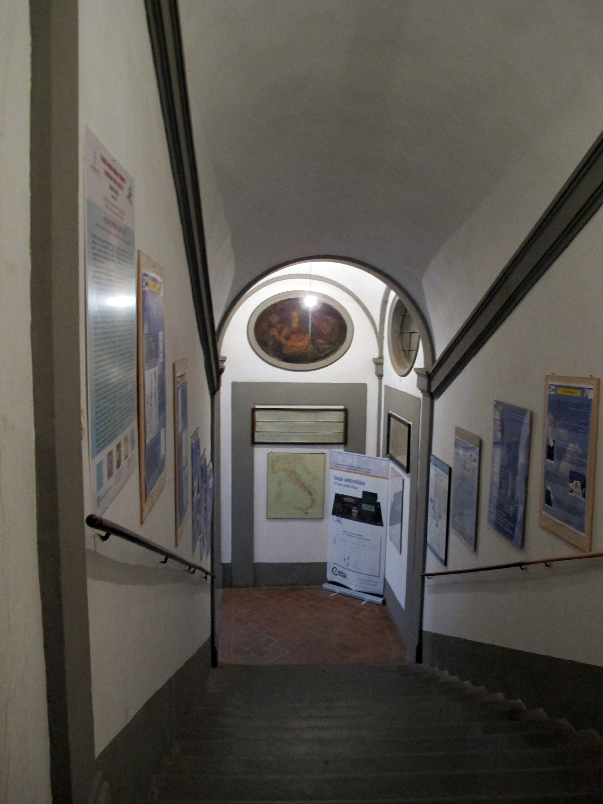 Osservatorio ximeniano, scalone